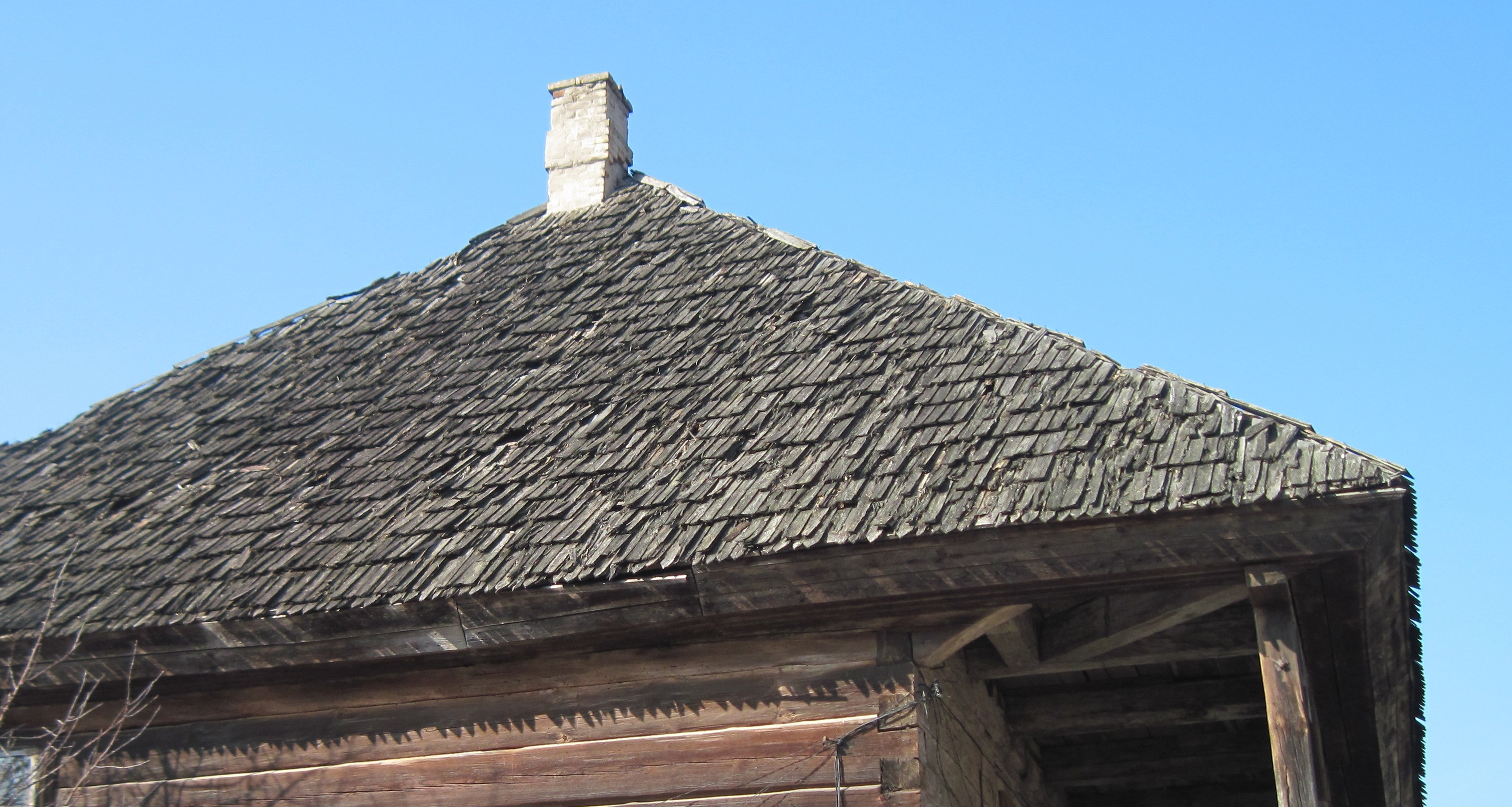 Дах лямуса на кляштары брыгітак у Гродна